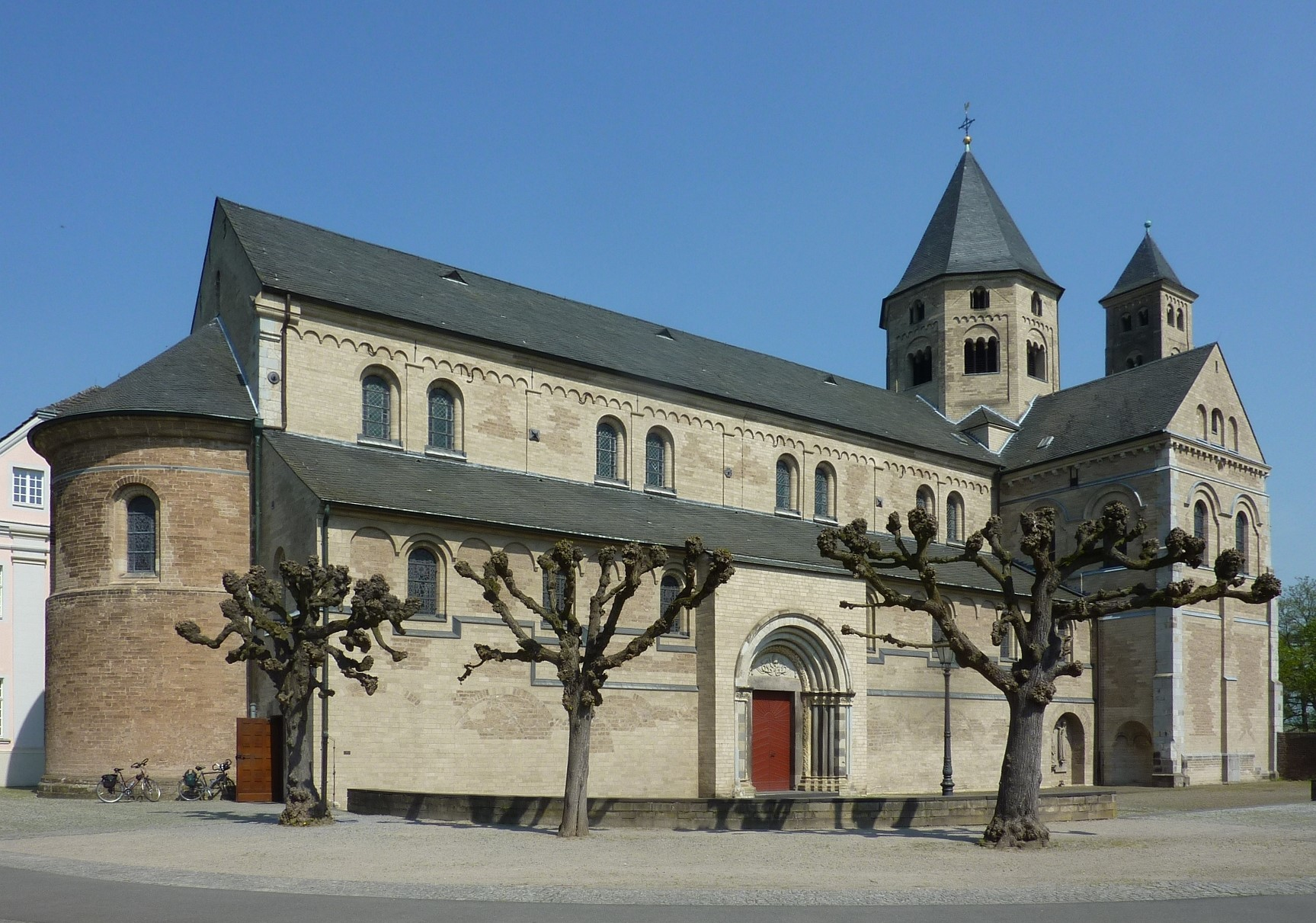 St. Maria Magdalena und St. Andreas (Knechtsteden)